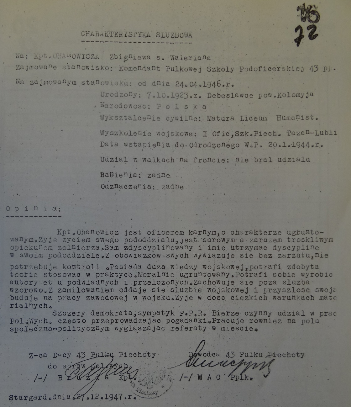 Opinia służbowa oficera 43 pp kpt. Ochanowicza wystawiona przez dowódcę 43 pp ppłk Maca